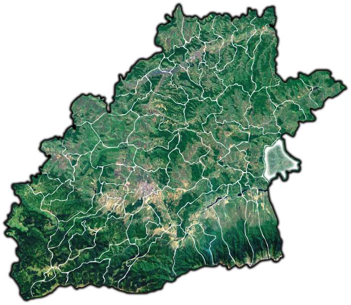 Bruiu jud Sibiu